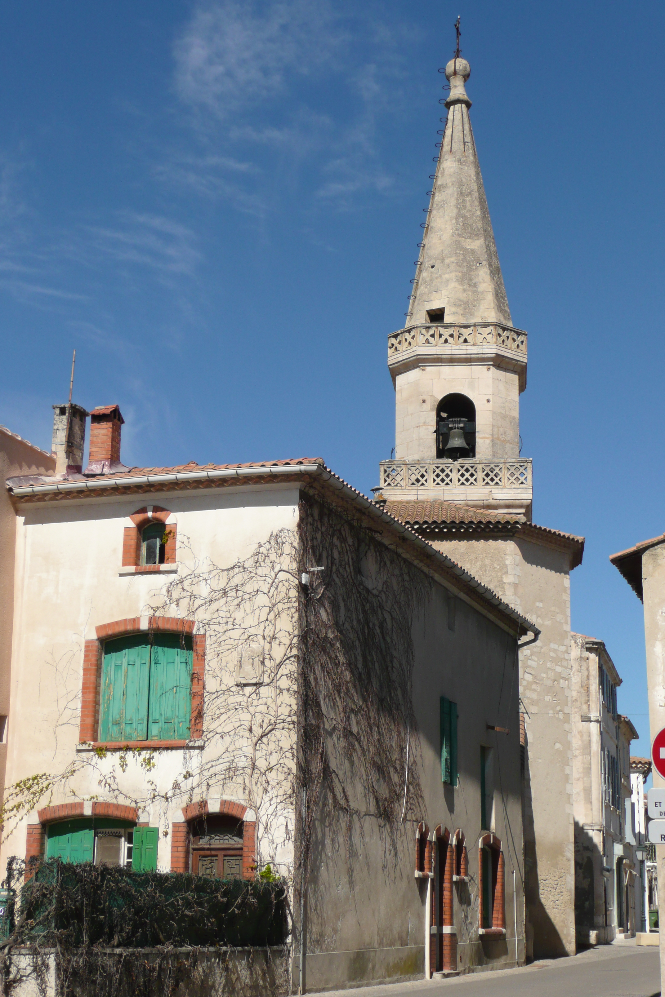 Maillane.